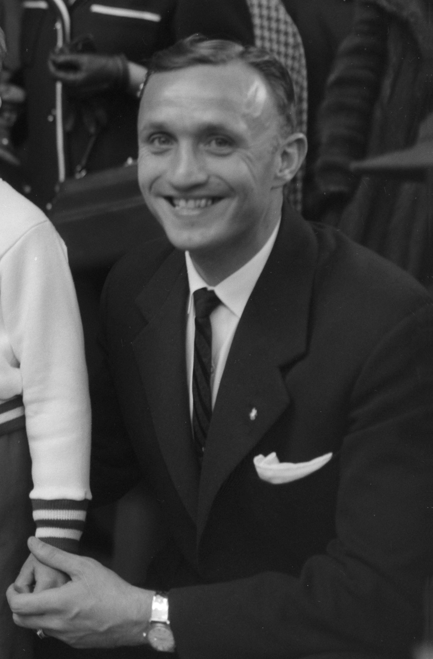 Santamaria op Schiphol